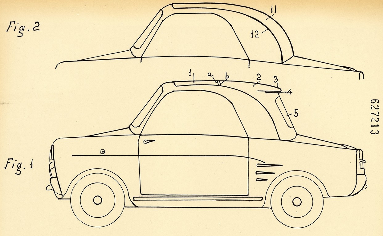 Disegno per il brevetto per invenzione industriale n. 627213, classe B 62 d, della societo' Igino Pieralisi-Mario Feliciani-Abramo Galassi sarl per una copertina per autoveicoli in genere, di tipo cosiddetto trasformabile, costituita da una parte mobile in tela, o simile, e da una parte rigida in materiale plastico Faber-Plast, Fabriano (AN). Data di deposito: 19 febbraio 1960. Data di concessione: 27 ottobre 1961 (AS Genova, Ufficio provinciale industria, commercio e artigianato di Genova, Fondo Brevetti)